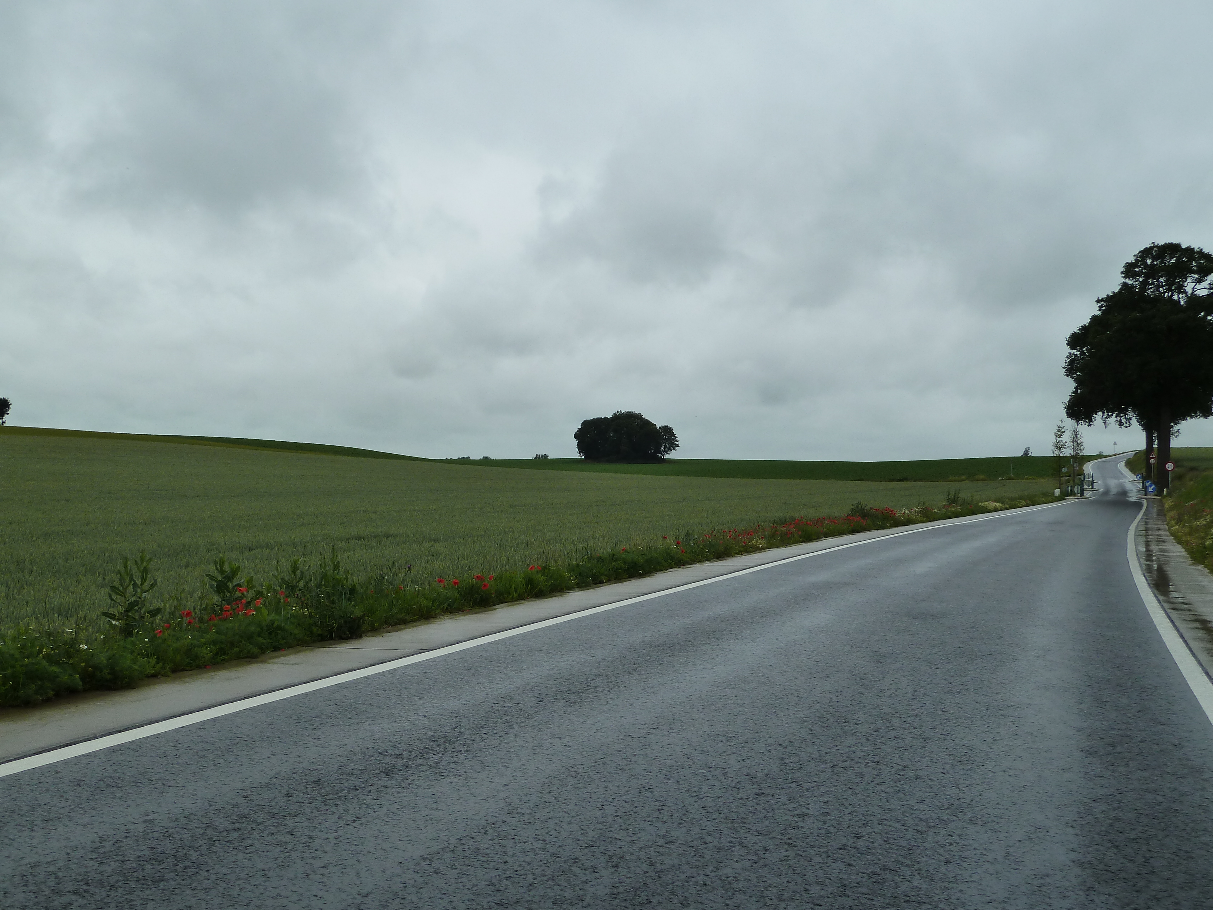 Tumulus d'Avennes, Avennes, Braives, Belgique